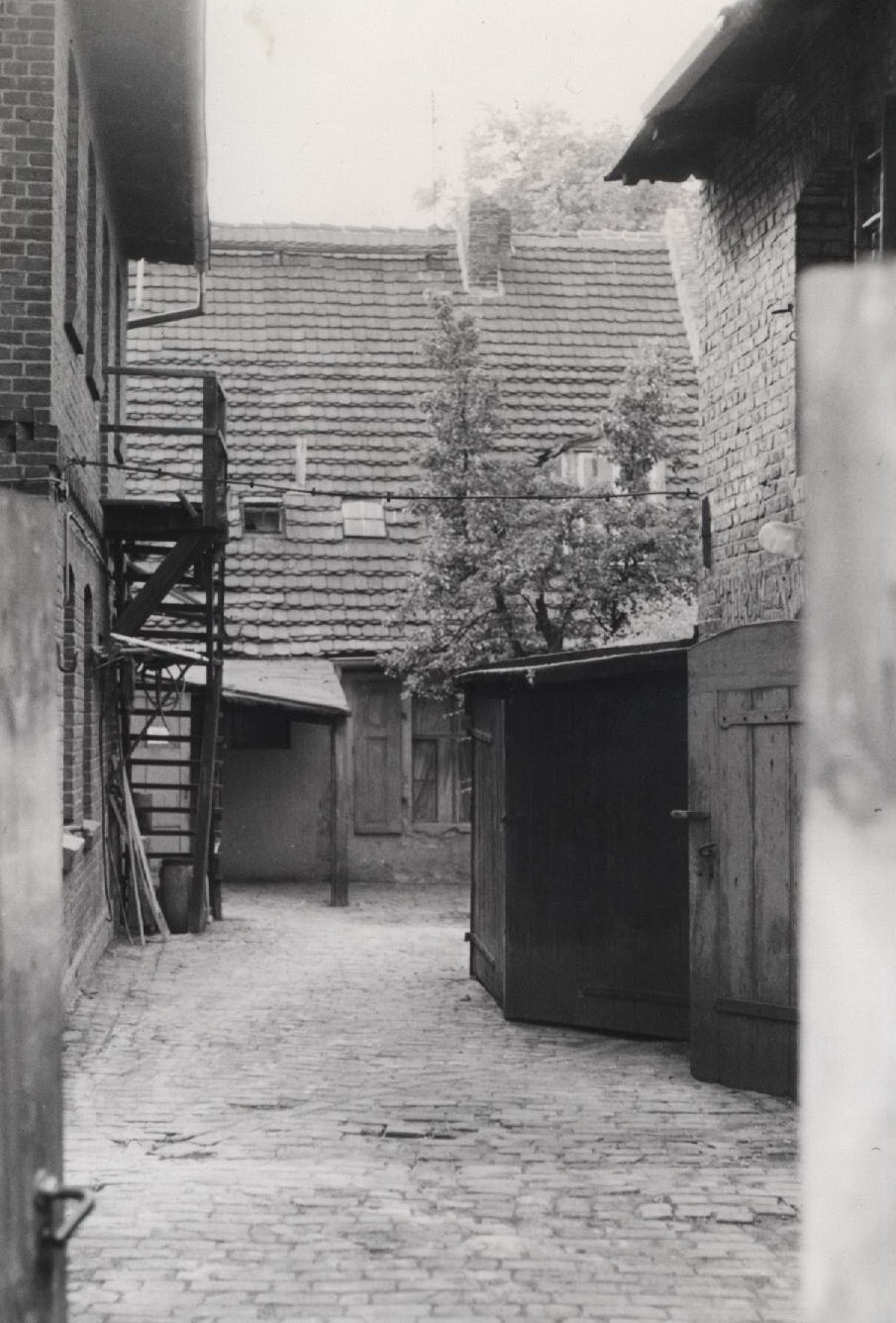 Hofgebäude eines Gehöfts im Kietz von Köpenick